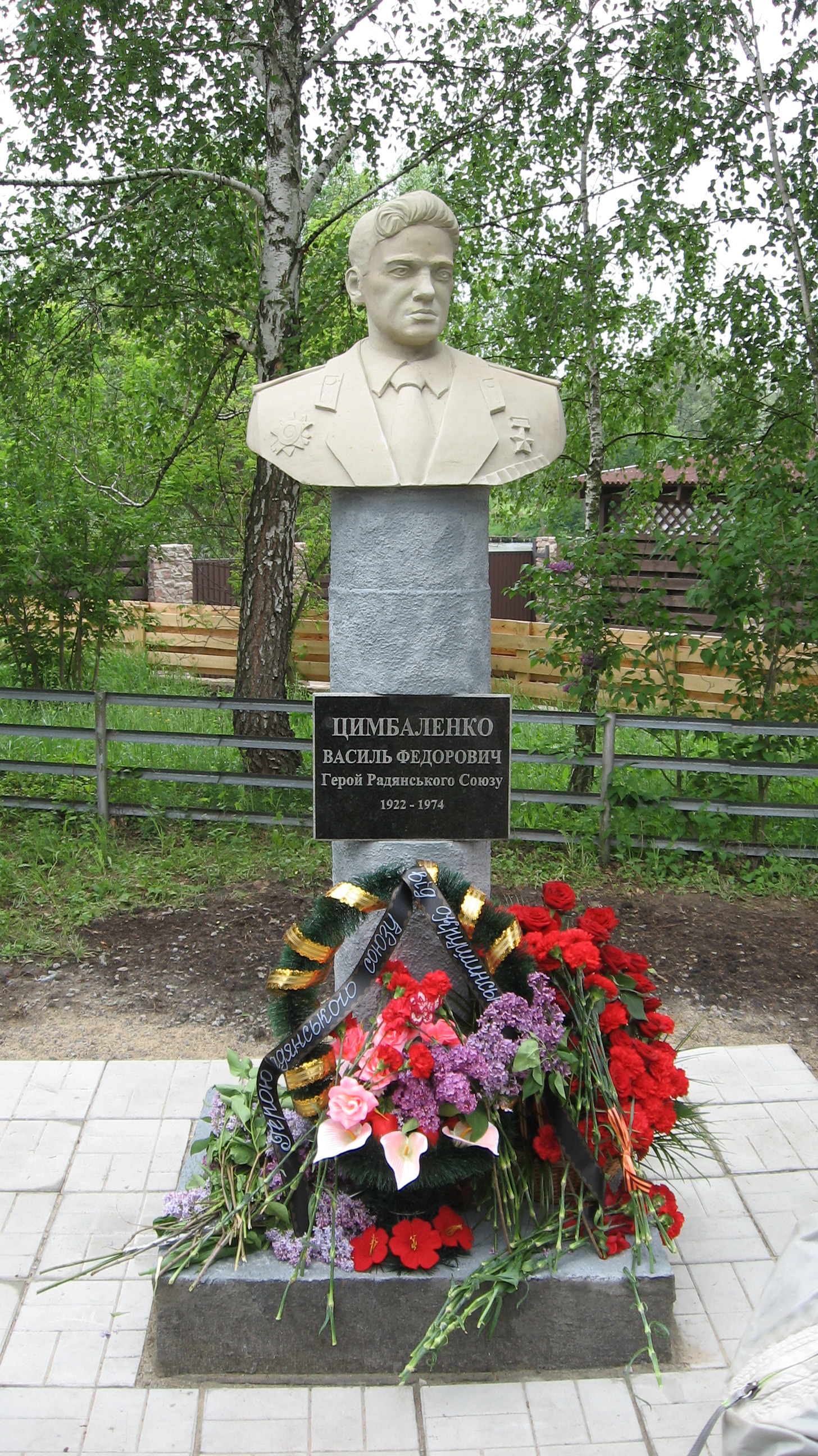 Памятник Герою Советского Союза Цымбаленко В. Ф. в селе Малая Бугаевка Васильковского района Киевской области 3